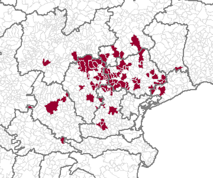 Comuni italiani con presenza di proprietà immobiliari della famiglia degli Ezzelini.